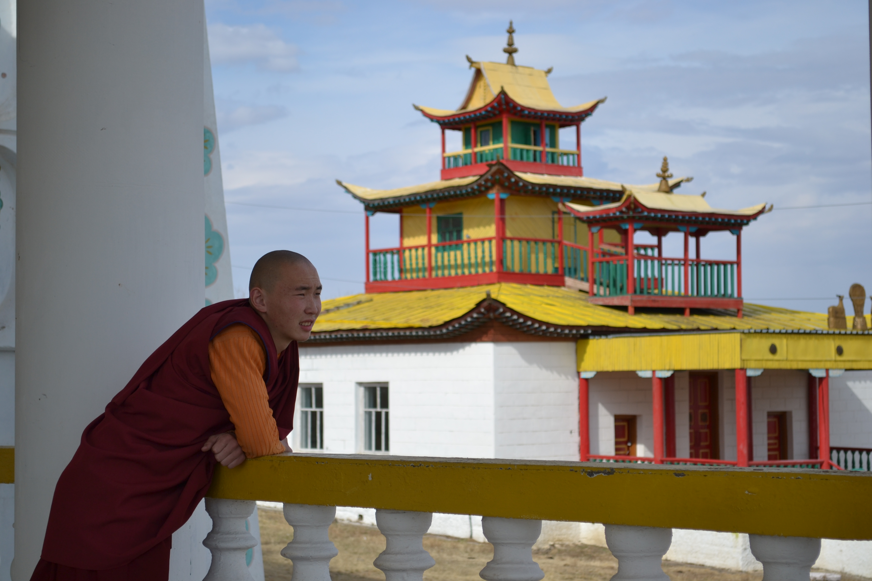 Сартул-Гэгэтуйский дацан, село Гэгэтуй, Джидинский район, Республика Бурятия